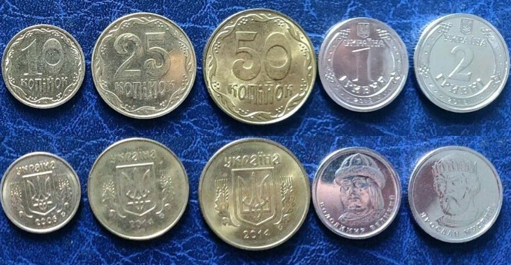 Обігові монети України на жовтень 2019